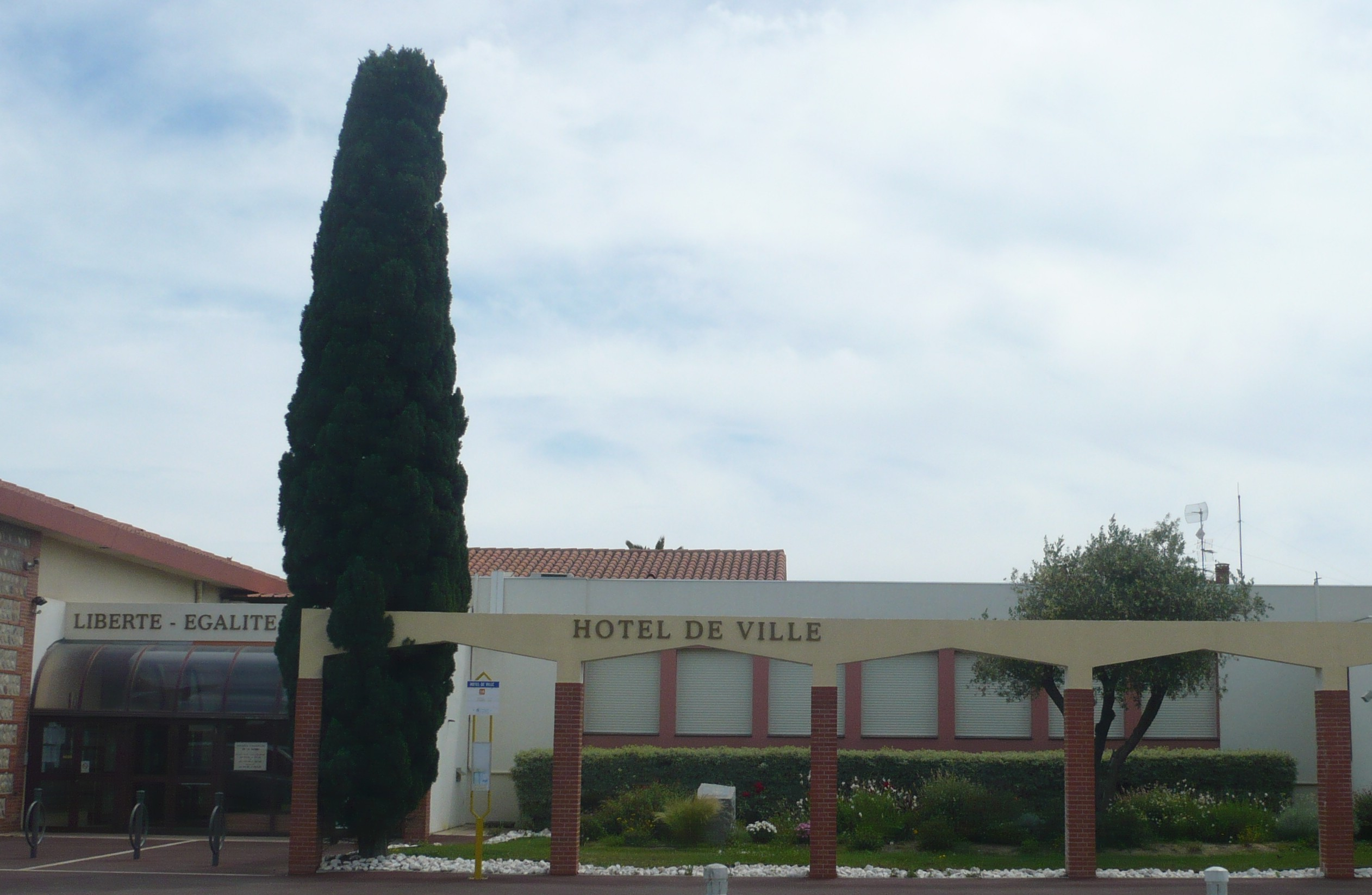 La mairie de Saleilles